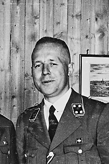 Gerhard Flesch, SS-Sturmbannführer og Sipo-sjefi Trondheim.